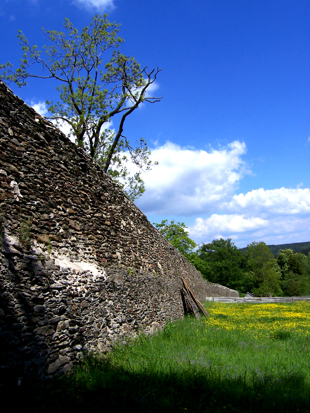 Kloster Grünhain, Nördliche Klostermauer